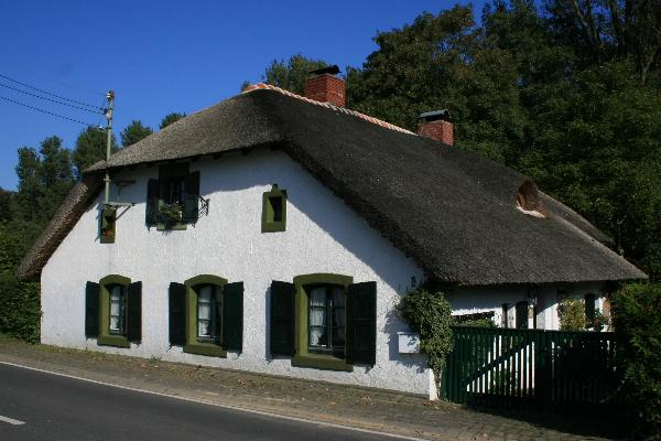 Reetdachhaus in Wegberg-Schwaam